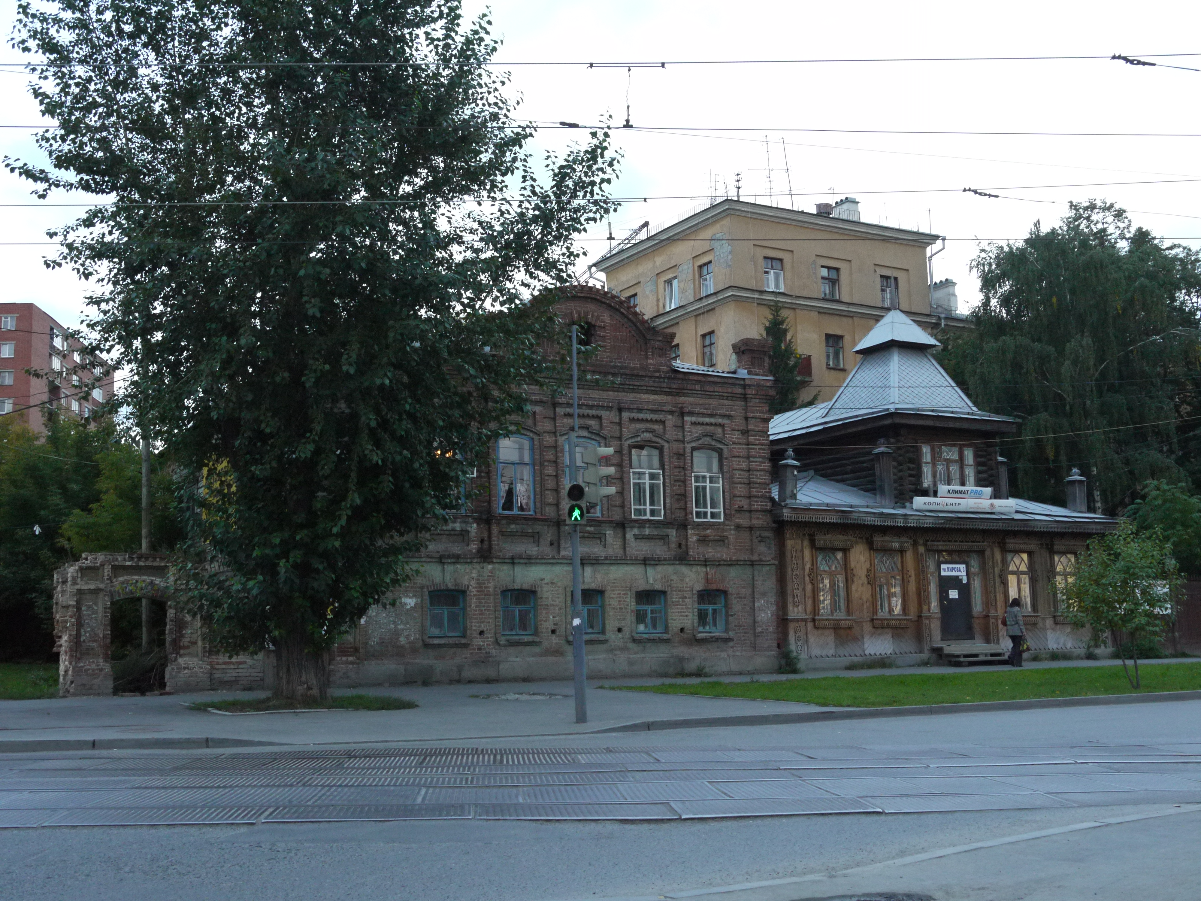 Вид на дом Бревновых и особняк, Екатеринбург, ул. Кирова, д. 1, д. 3